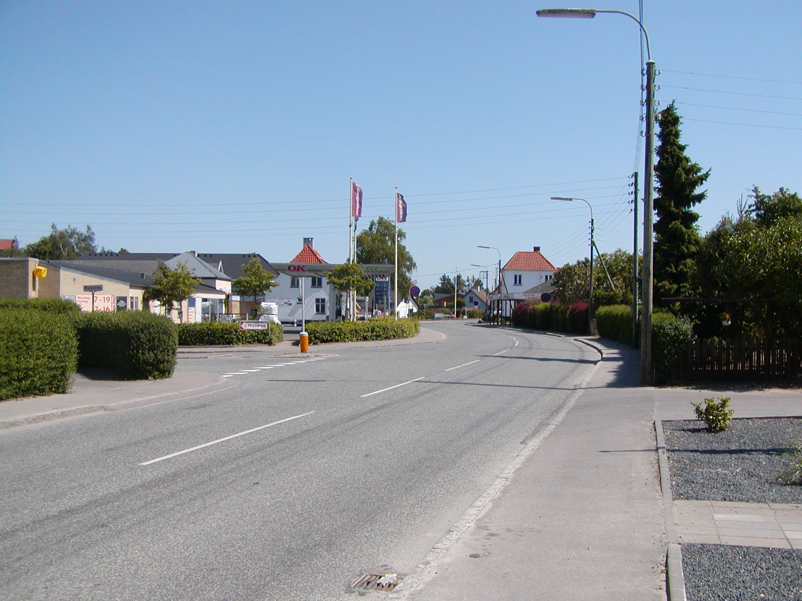 Skævinge Hovedgade